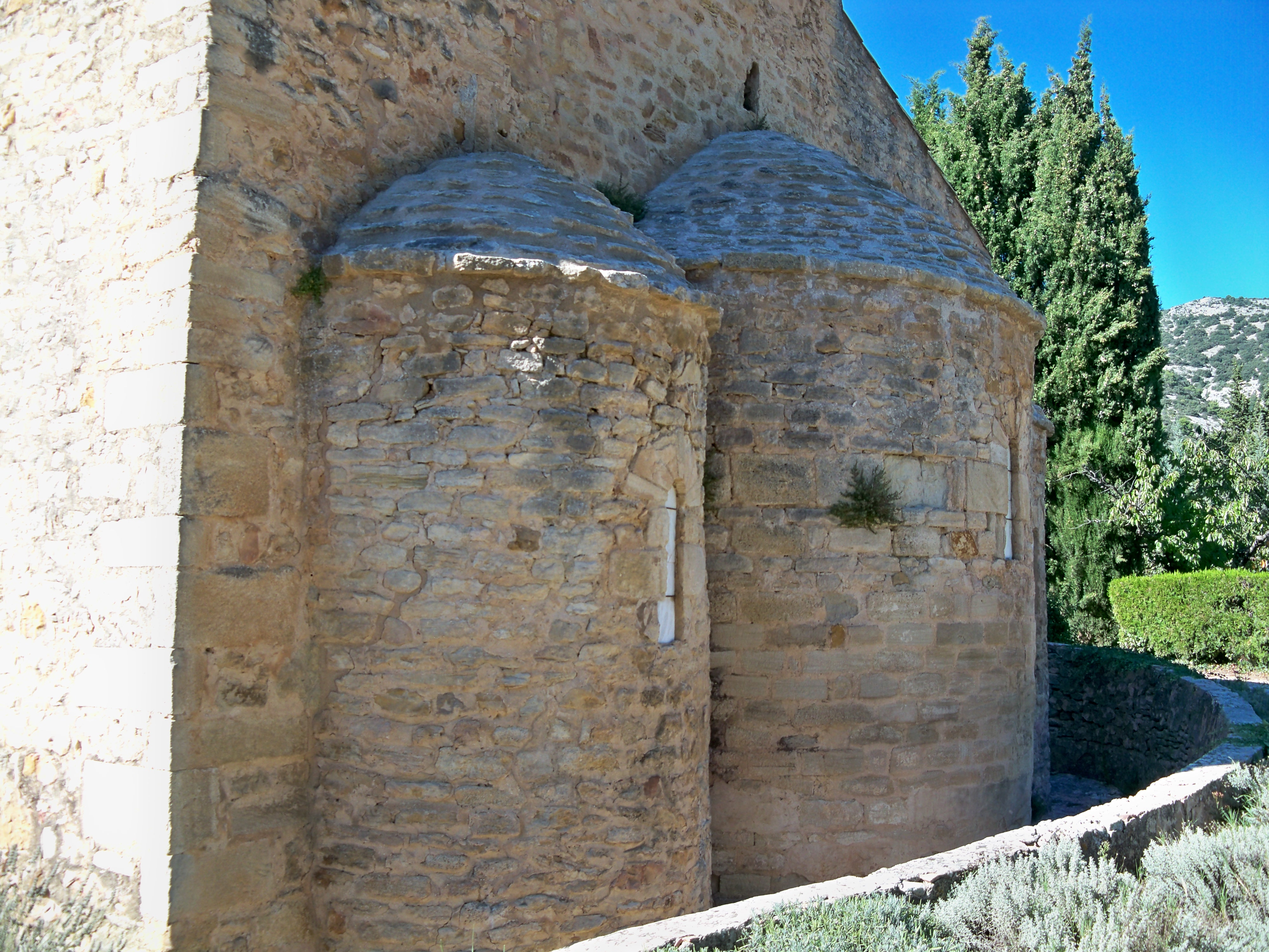 Chapelle de la Madeleine à Bédoin (84)